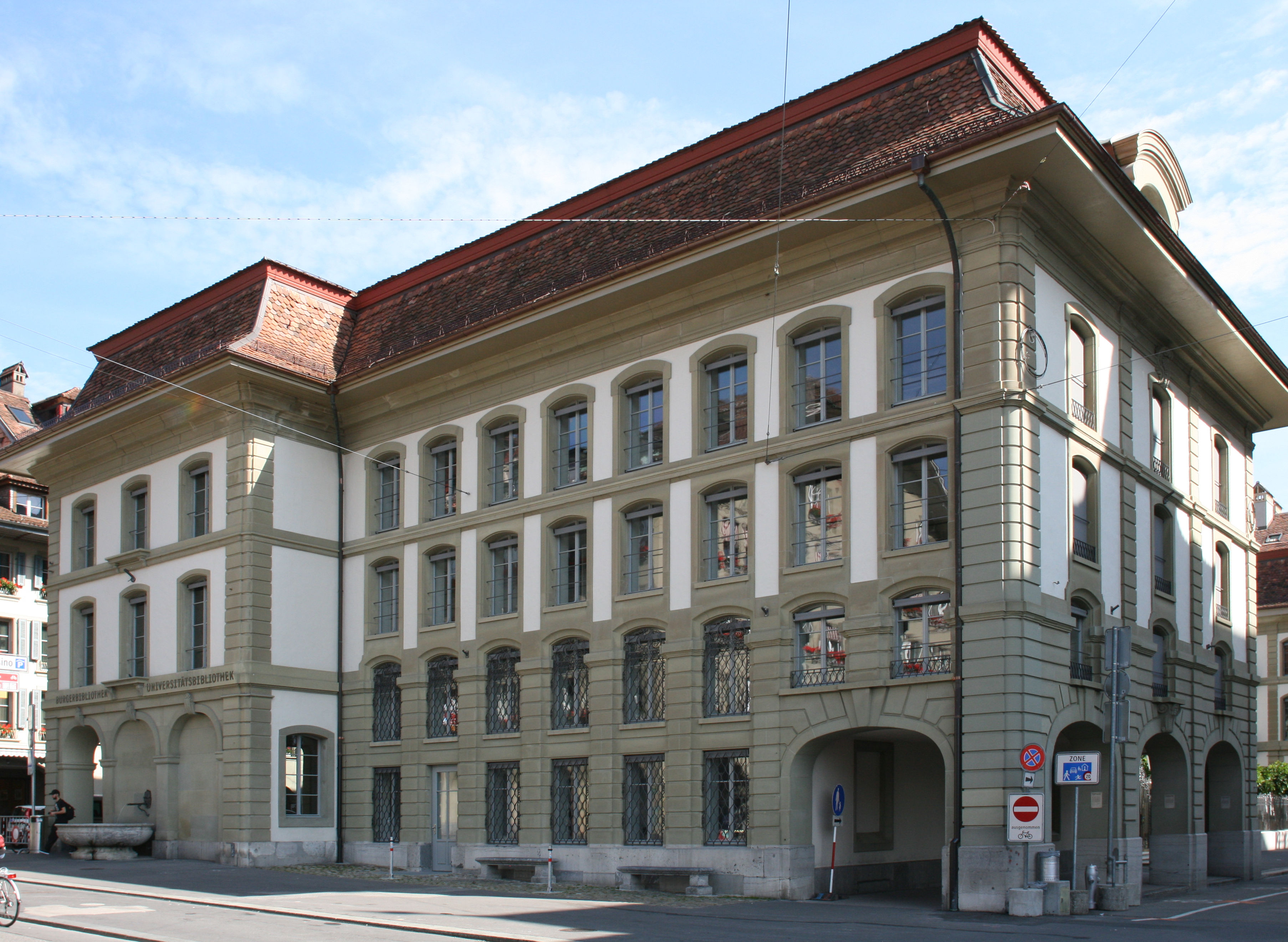 Bibliothek Münstergasse (Burger- und Universitätsbibliothek), Münstergasse 61 in Bern